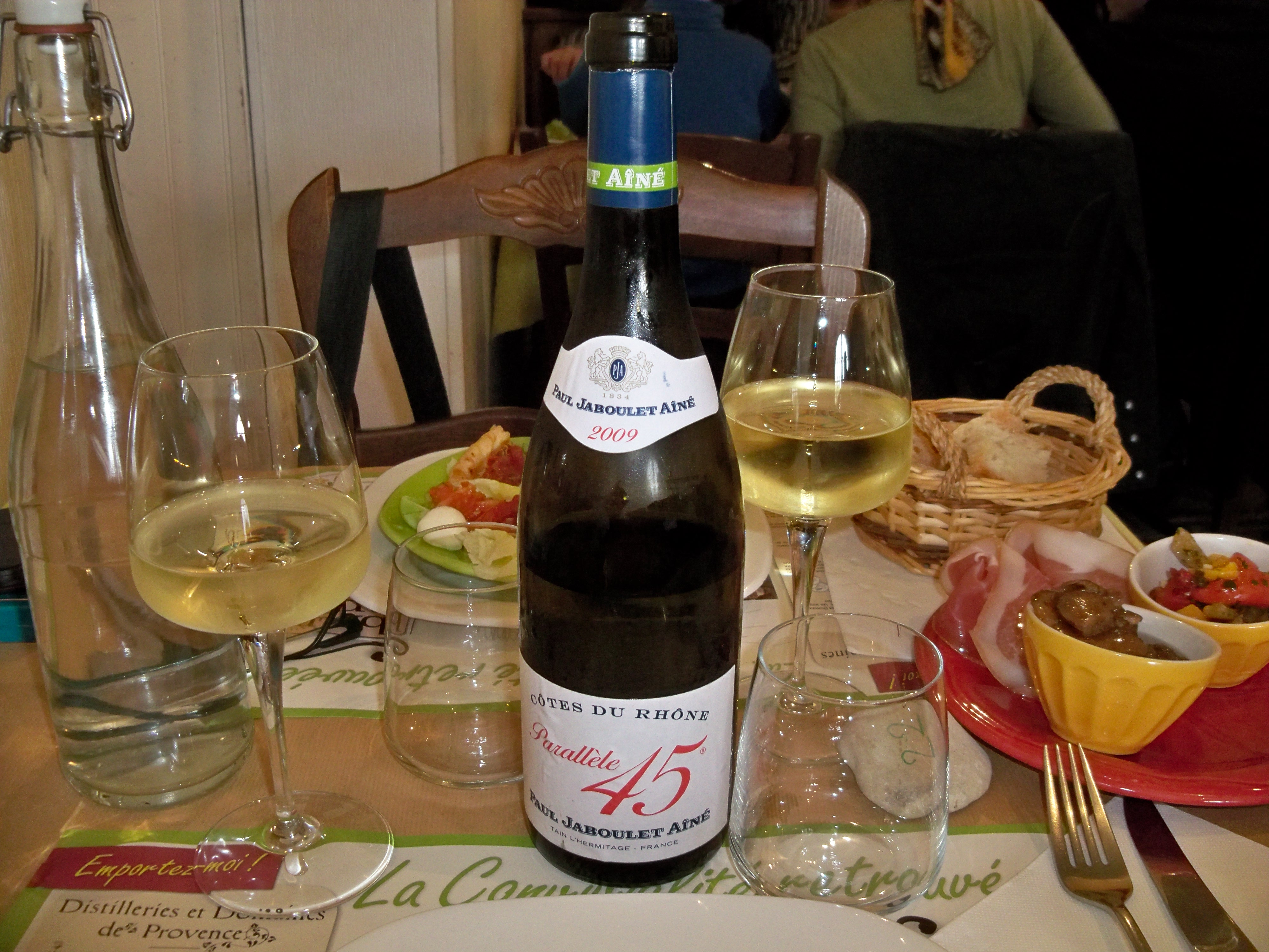 Bouteille de Tain, 45 ème parallele